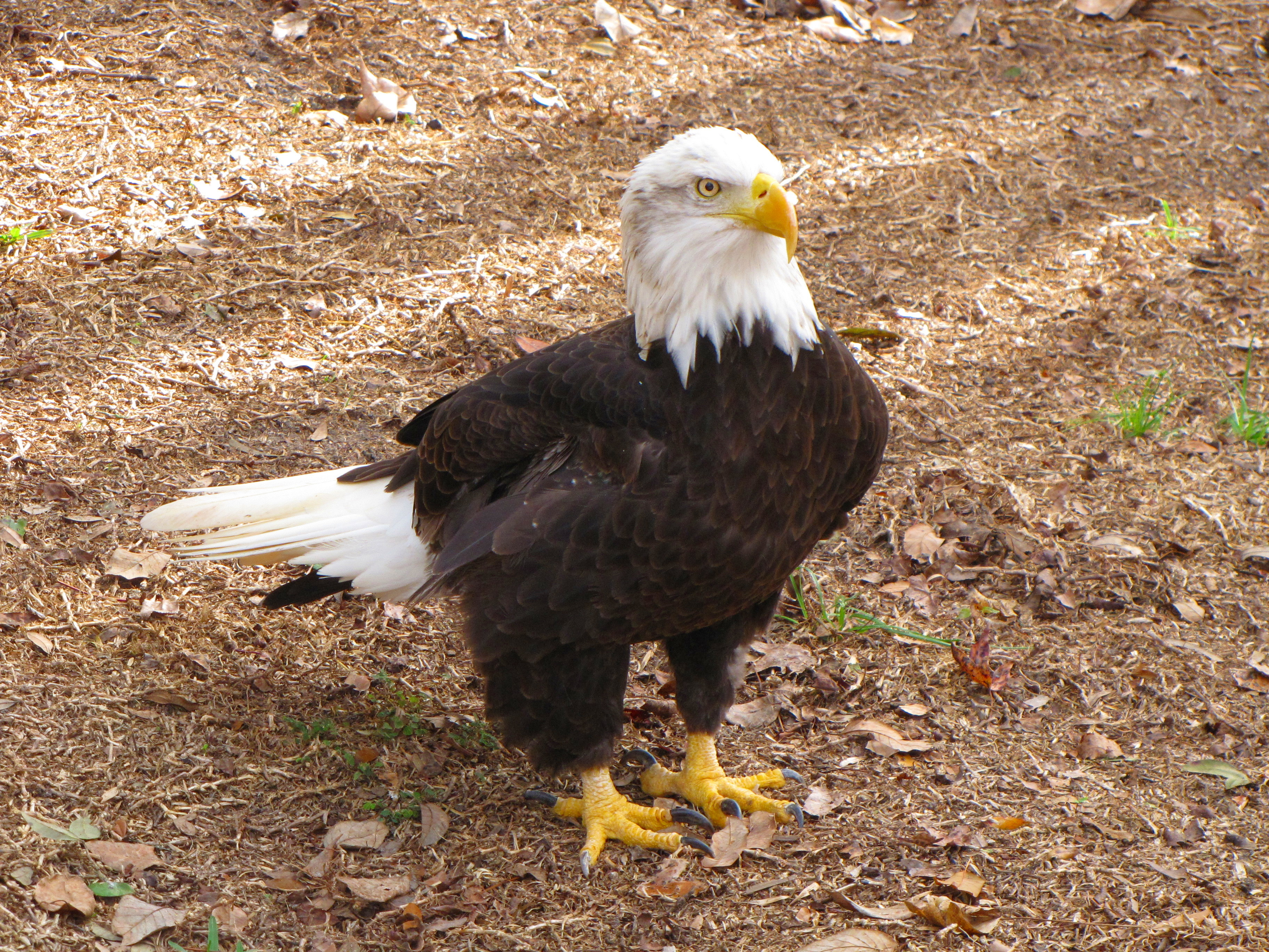 Haliaeetus leucocephalus Homossassa Springs State Park Homossassa, Florida